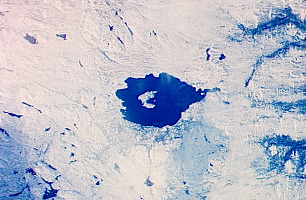 Lac Mistastin